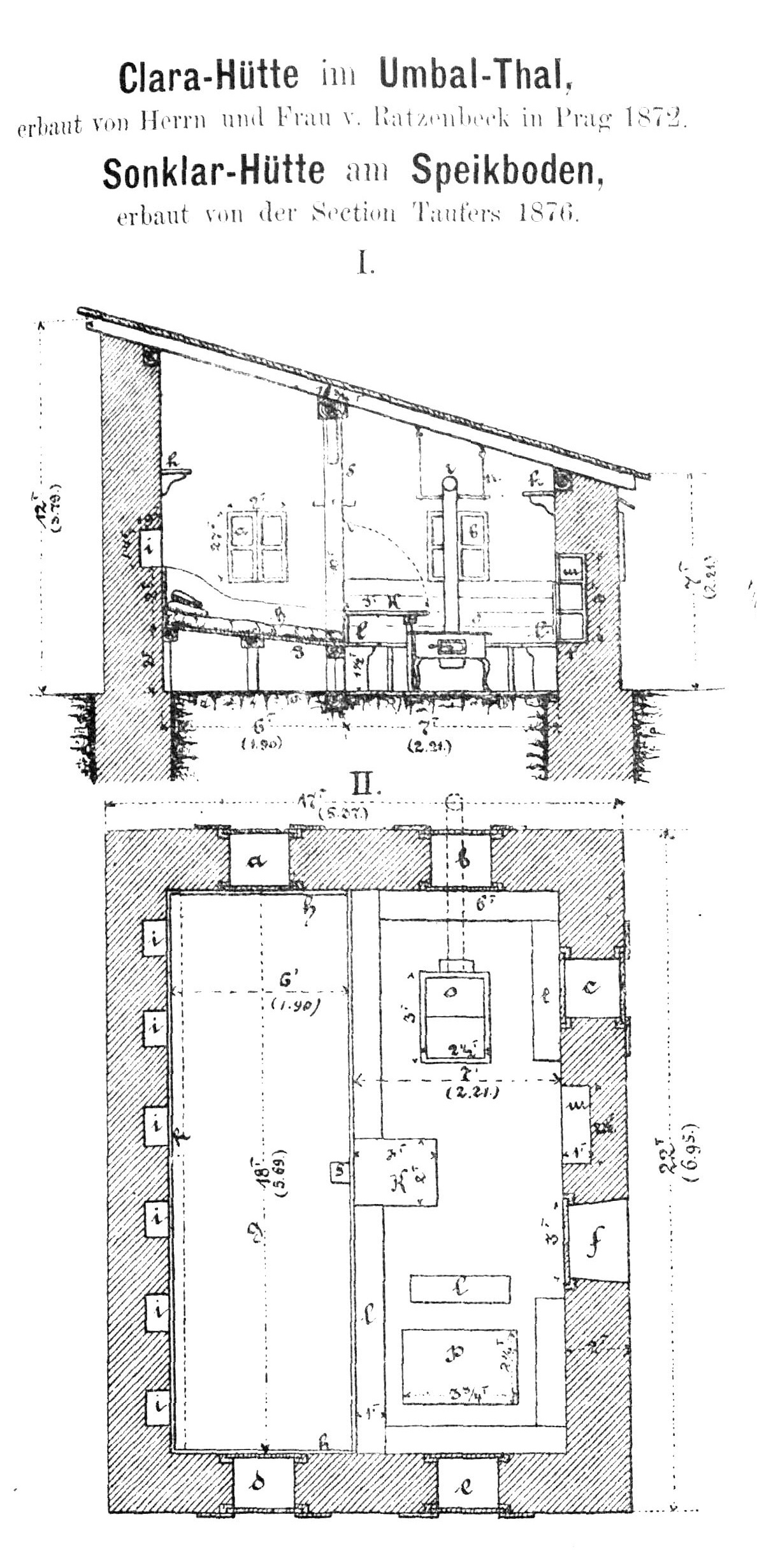 Entwurfszeichnung der Clarahütte und der Sonklarhütte aus Zeitschrift des Deutschen und Österreichischen Alpenvereins Bd.08 (1877)